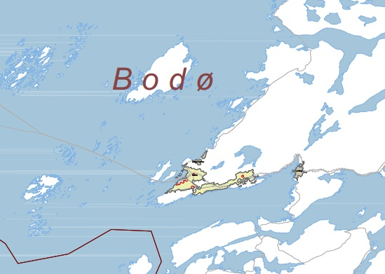 Dette kartet viser tettstedet Bodø med sentrumssoner og de to forstedene Løpsmarka i nord og Løding i øst.